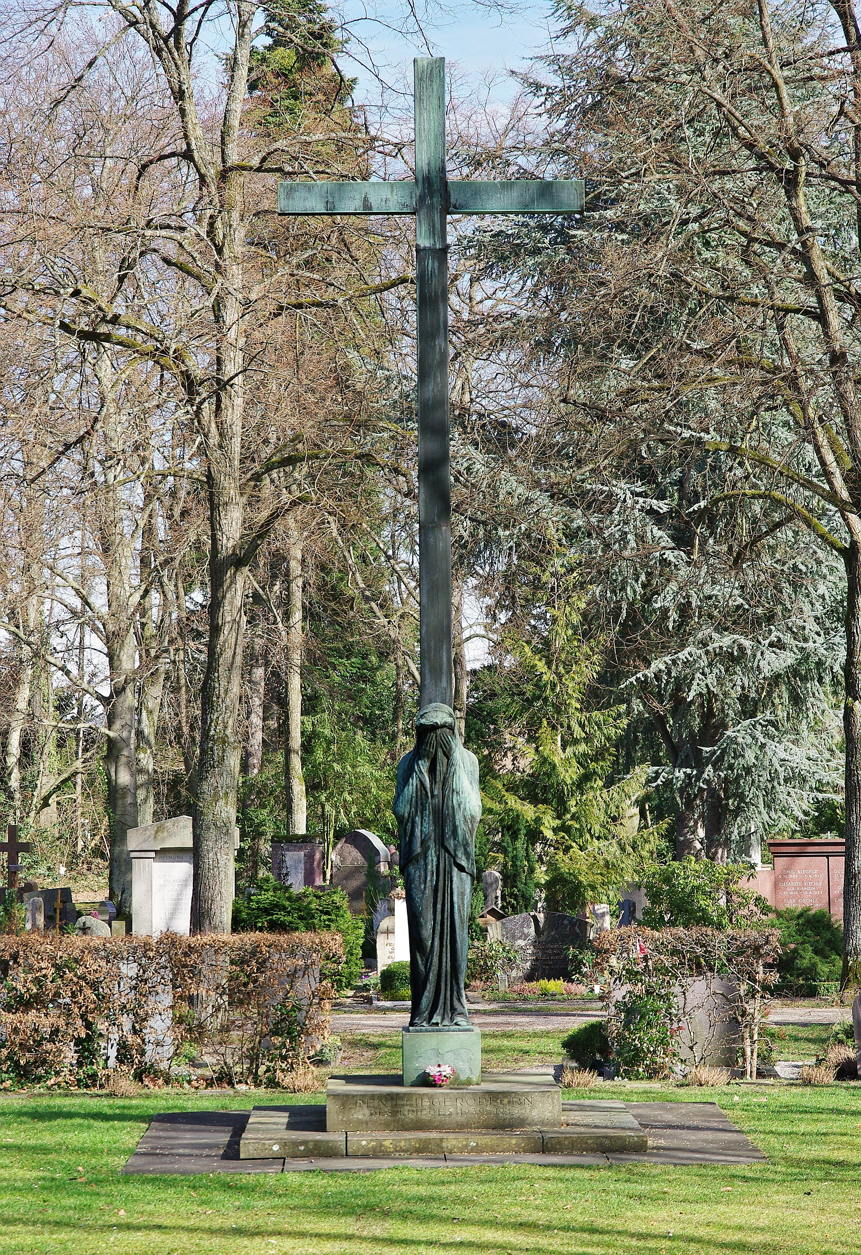 Bilder vom Hauptfriedhof Freiburg, der seit 1872 besteht